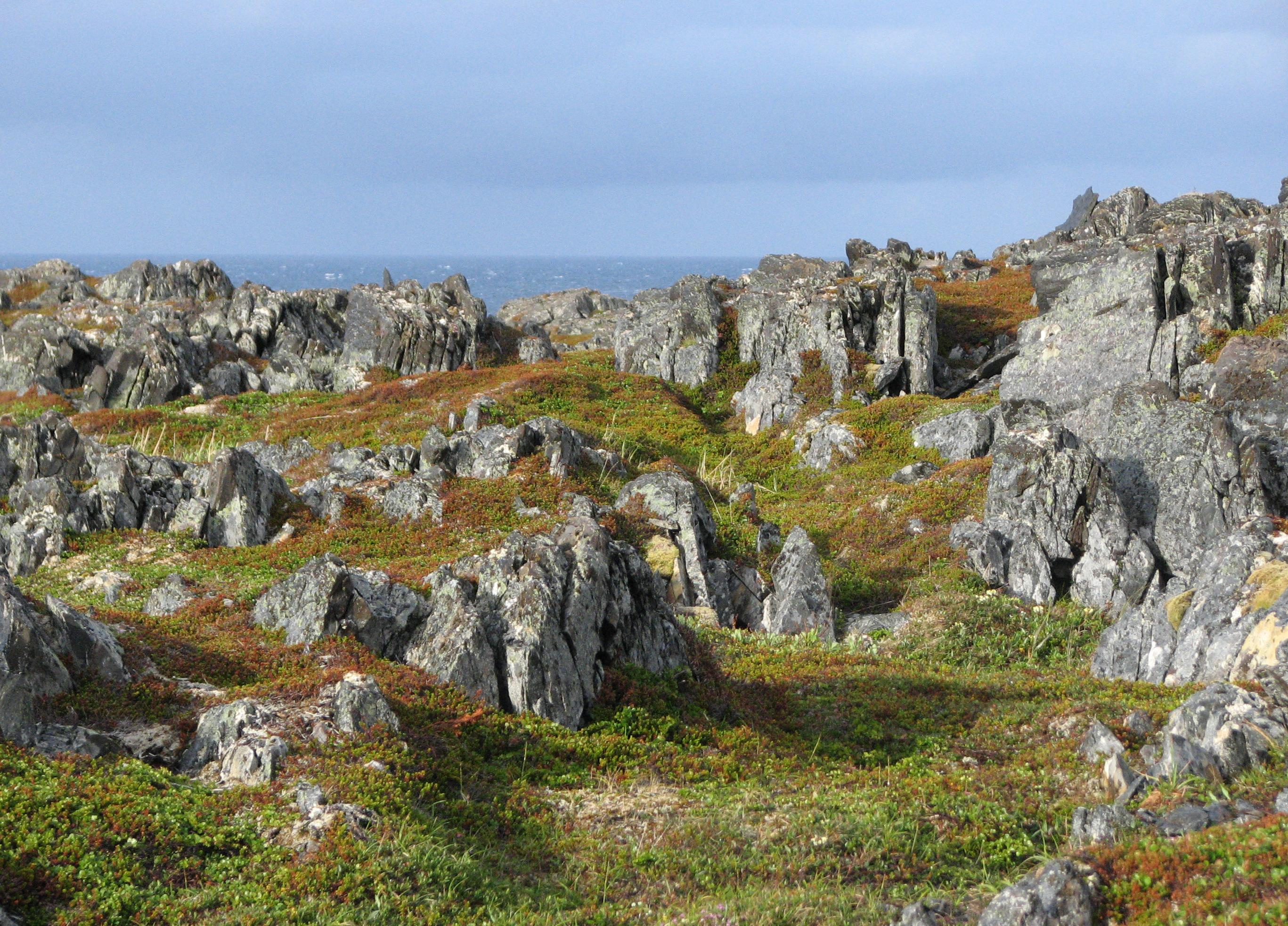 Slettnes Nature Reserve, Finnmark, Norway